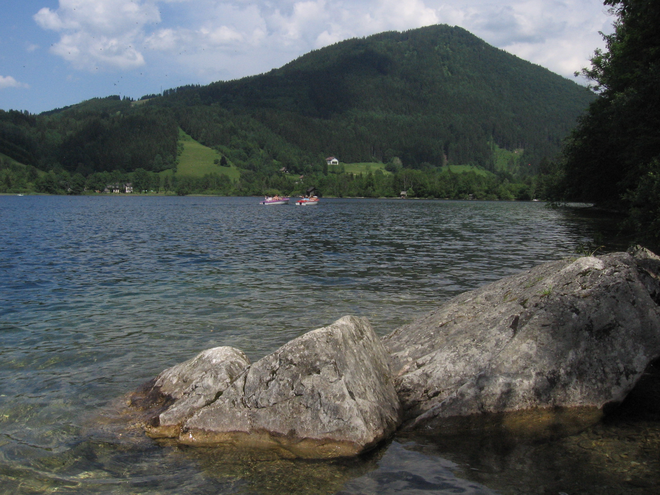 Lunzer See mit Maisszinken (1075 m.ü.A.)